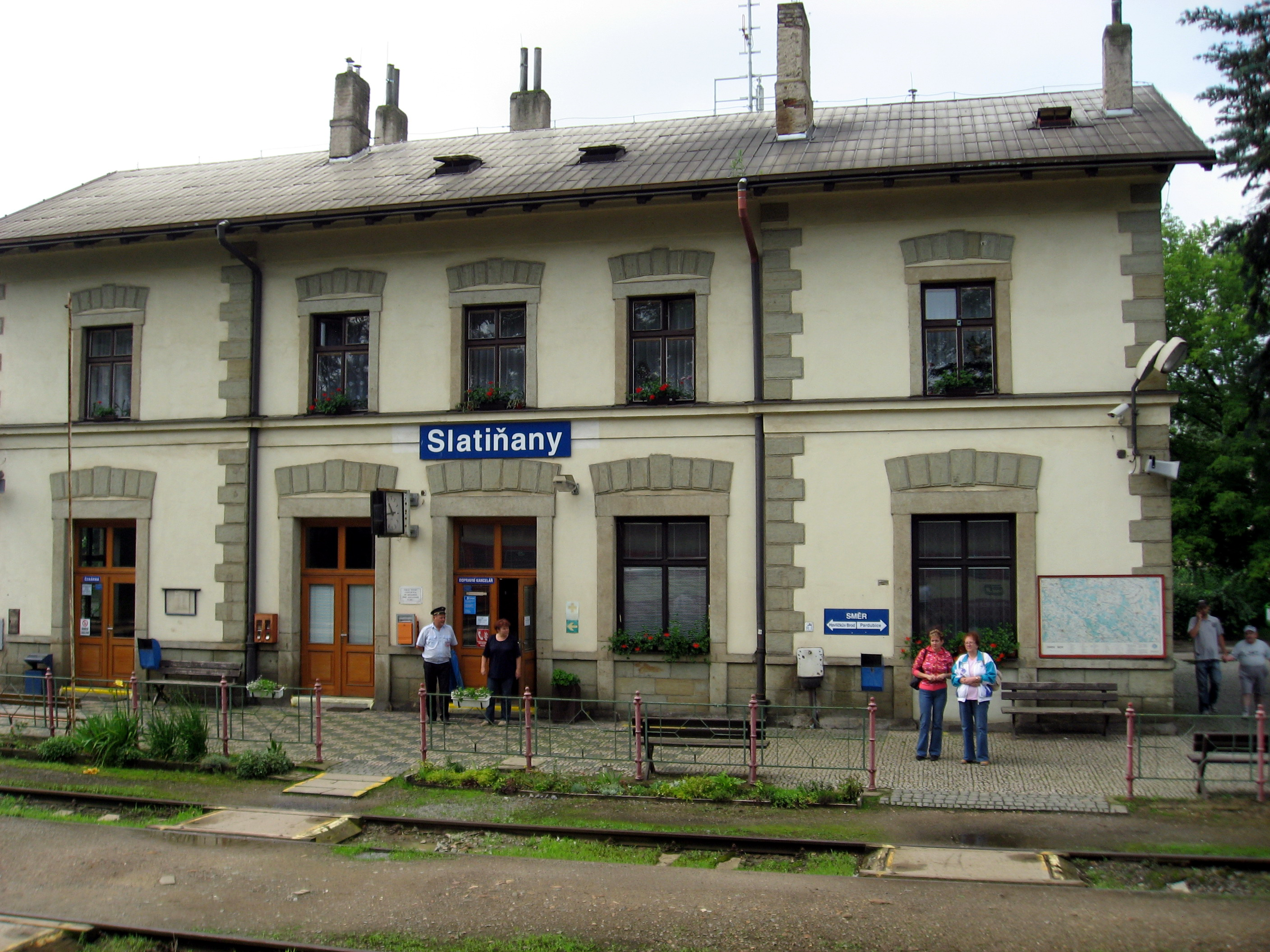 Slatiňany, železniční stanice